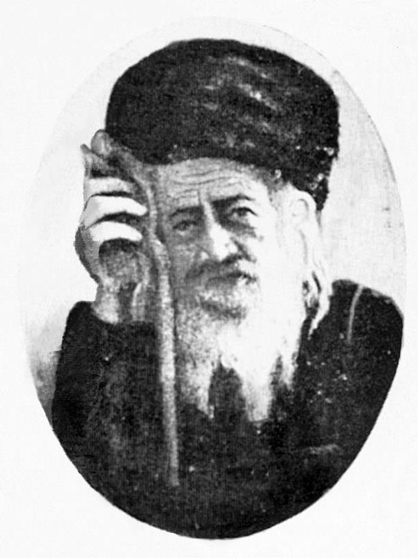 Ребе Шломо Майер из Сасова, умер во Львове в 1919 г.